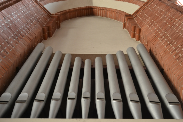 Prospekt der Chororgel der Reformationskirche in Berlin-Moabit.